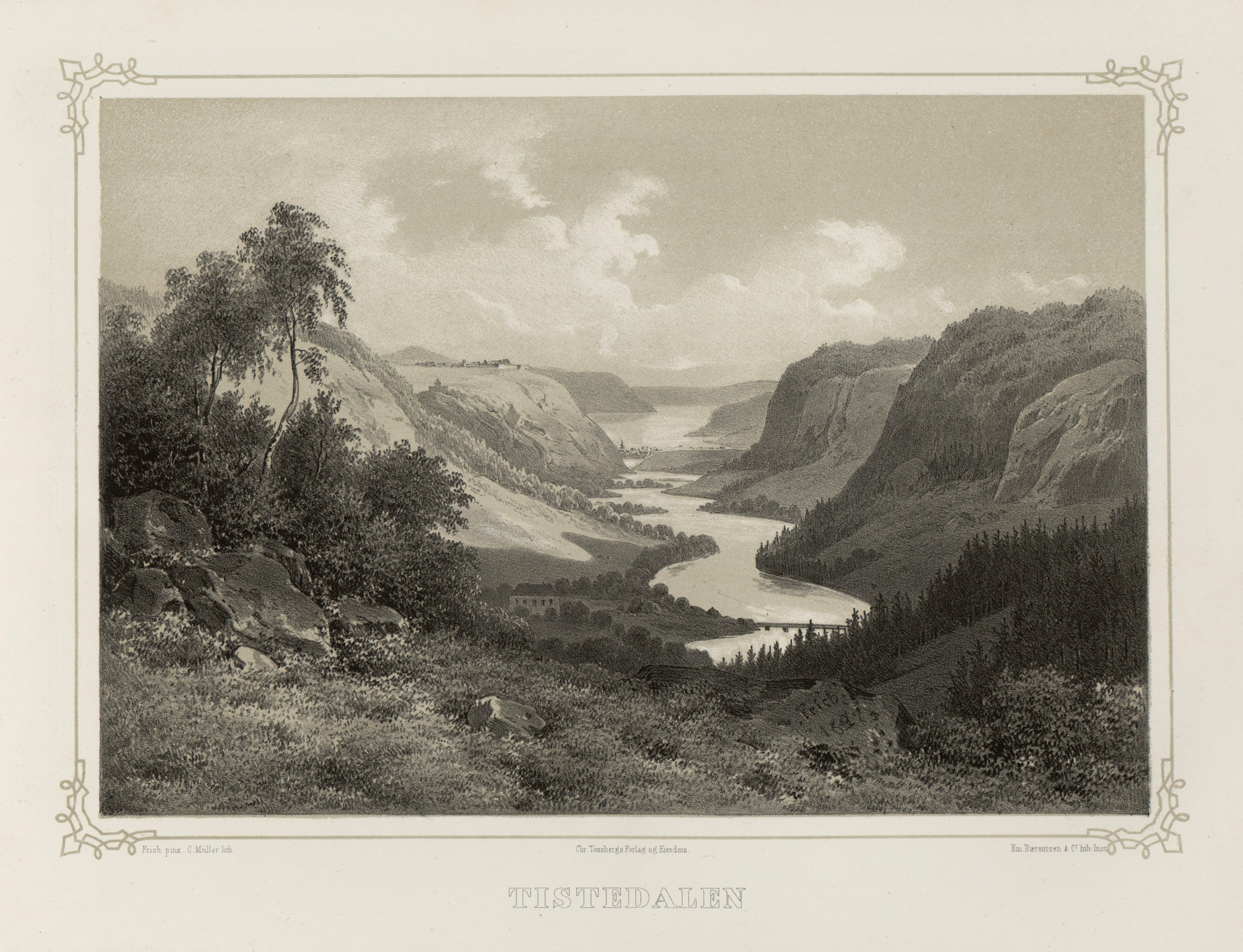 Illustrasjon hentet fra boken "Norge fremstillet i Tegninger" av Asbjørnsen, P.Chr. og utgitt av Chr. Tønsberg (no, 1848)